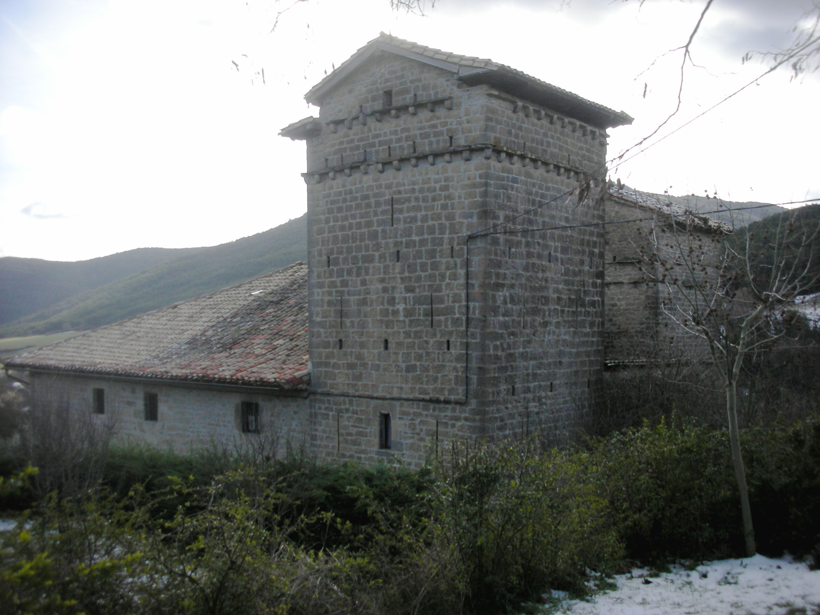 Palacio de Cabo de Armeria, en Zunzarren, Navarra